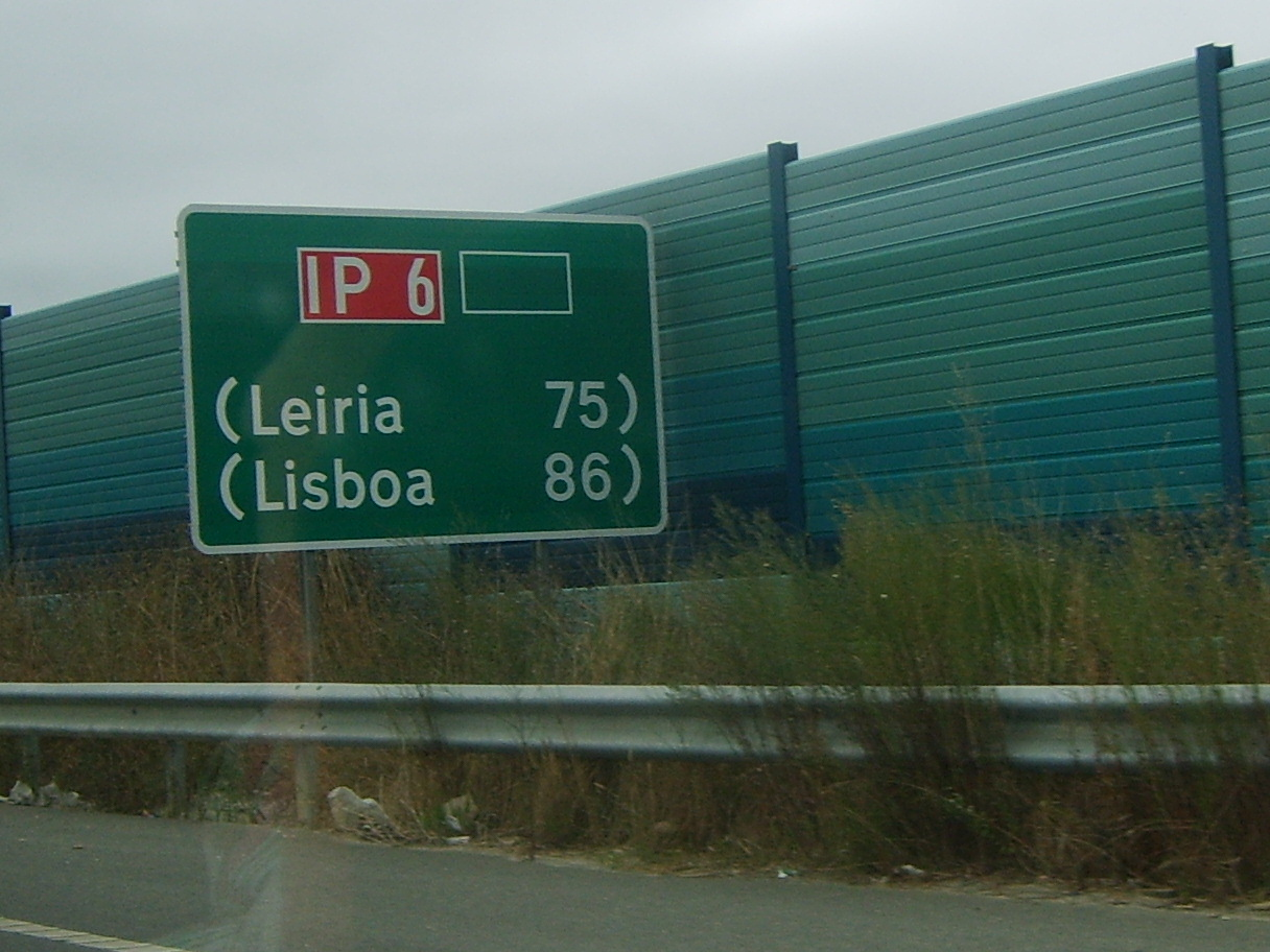 IP6